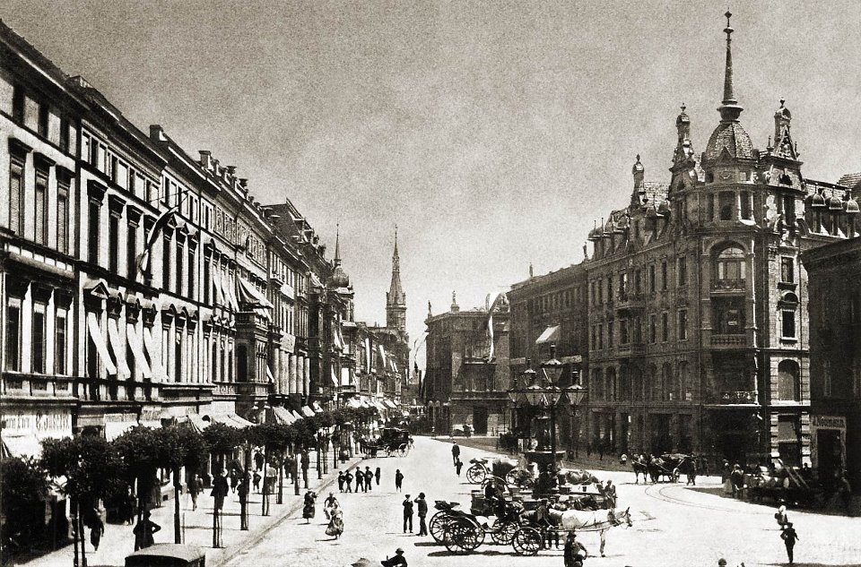 Plac Kościuszki przed wojną